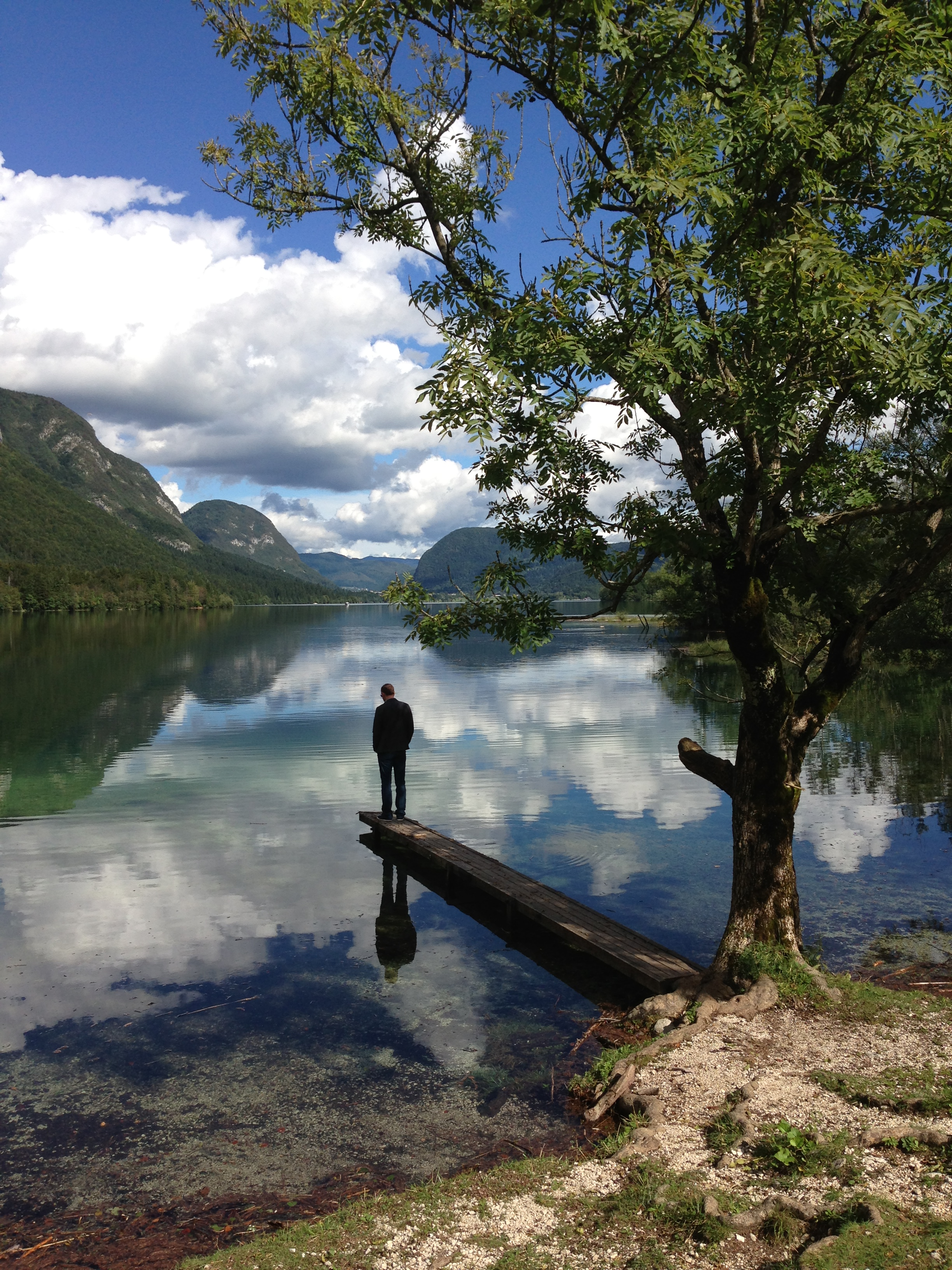 Slovenia's Secrets